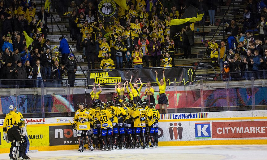 Data Group Areena, 2016-17 puolivälierät